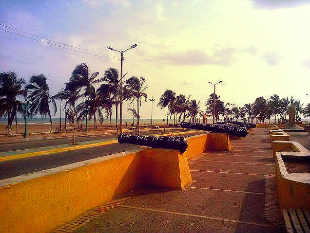 Parque de los cañones en Riohacha